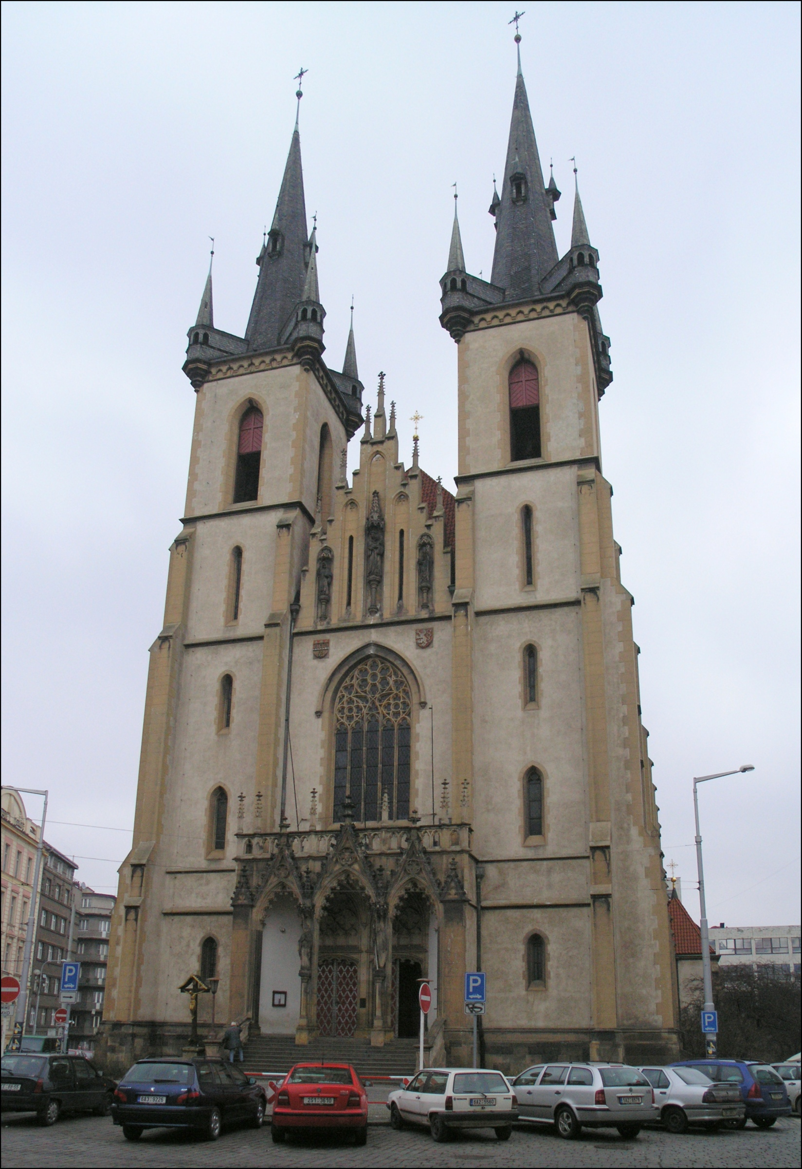 Kostel svatého Antonína z Padovy (Praha, Holešovice)